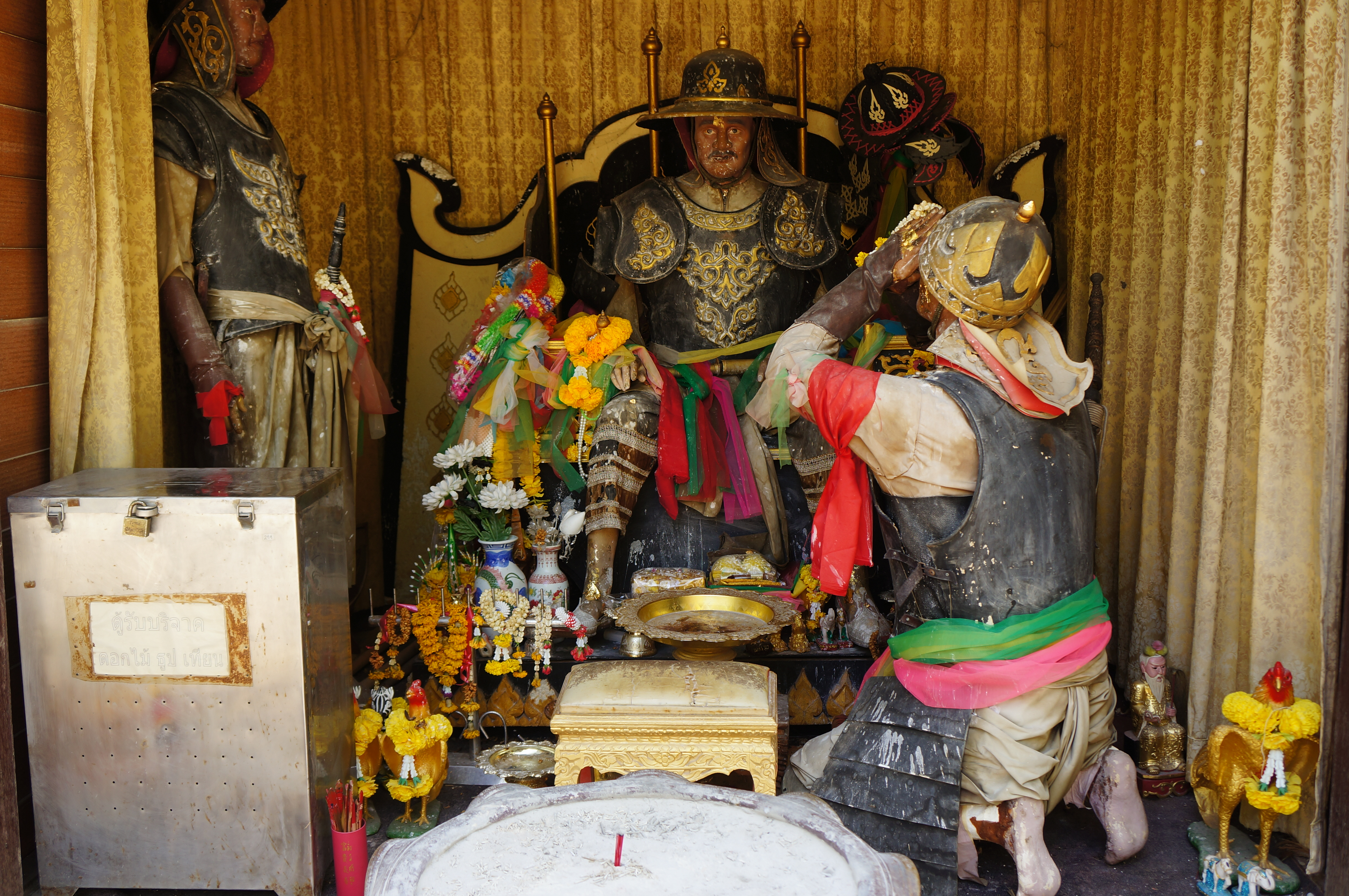 ศาลพันท้ายนรสิงห์ เป็นอนุสาวรีย์แห่งความซื่อสัตย์ รักษากฎระเบียบ กฎมณเฑียรบาลยิ่งกว่าชีวิตตน ตั้งอยู่ที่บ้านพันท้ายนรสิงห์ ตำบลพันท้ายนรสิงห์ อำเภอเมืองสมุทรสาคร จังหวัดสมุทรสาคร ศาลพันท้ายนรสิงห์ถูกประกาศขึ้นทะเบียนเป็นโบราณสถานของชาติ ในราชกิจจานุเบกษา เล่ม 72 ตอนที่ 2 เมื่อวันที่ 4 มกราคม พ.ศ. 2498 กรมศิลปากรได้ดำเนินการจัดสร้างศาลพันท้ายนรสิงห์ขึ้น อยู่ถัดจากศาลเก่าที่พังลงมาไม่มากนัก โดยกันอาณาบริเวณรอบ ๆ ศาลไว้ประมาณ 100 ไร่ เพื่อจัดตั้งเป็น "อุทยานพันท้ายนรสิงห์" ภายในศาลมีรูปปั้นของพันท้ายนรสิงห์ขนาดเท่าของจริงในท่าถือท้ายคัดเรือ